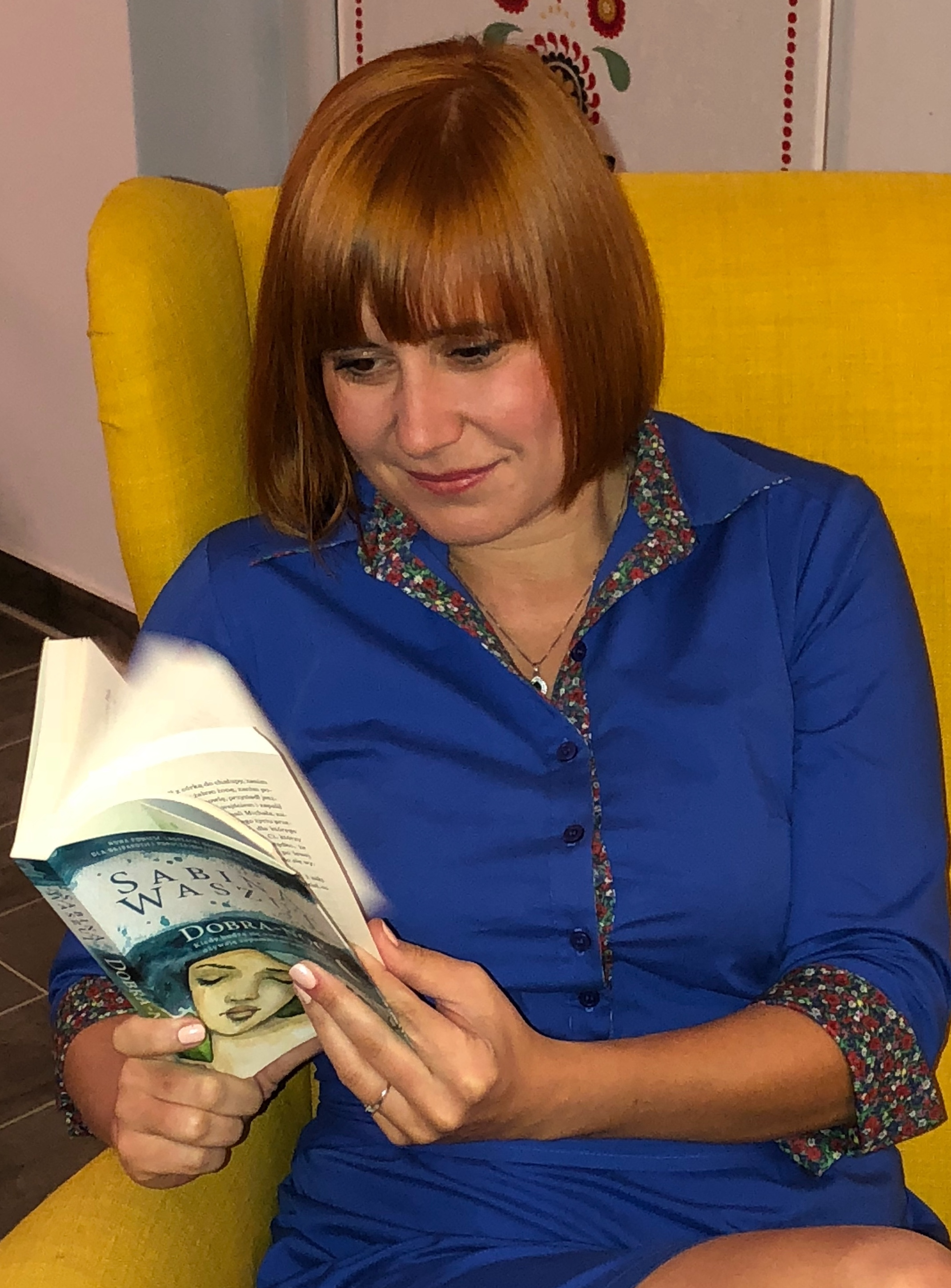 Sabina Waszut (2018)